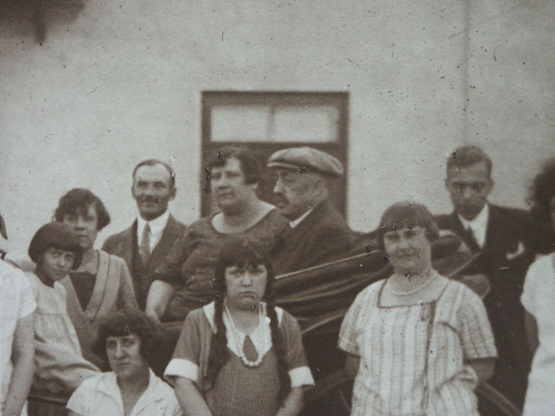 Family of , Polish landlord, a member of the Second Russian State Duma, 1907